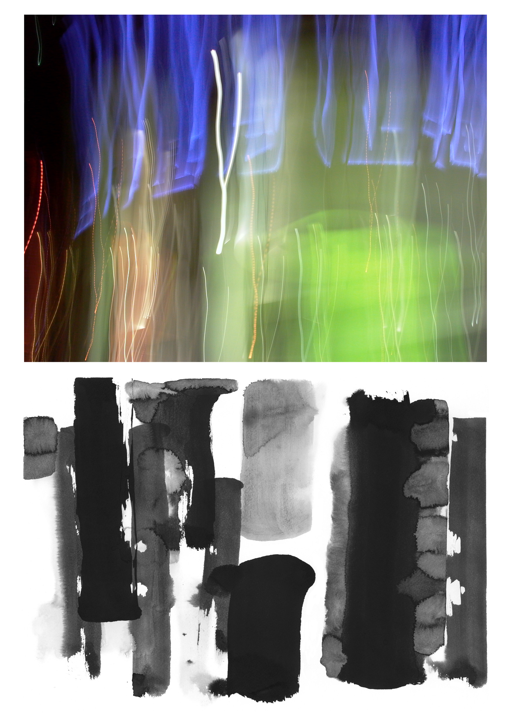 Nummer 2 der Fotoserie "Malendes Licht, Lebende Schatten"